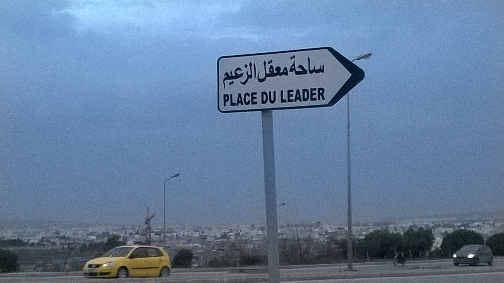 Bab Sidi Kacem, la médina de Tunis باب سيدي قاسم الجليزي ، مدينة تونس العتيقة